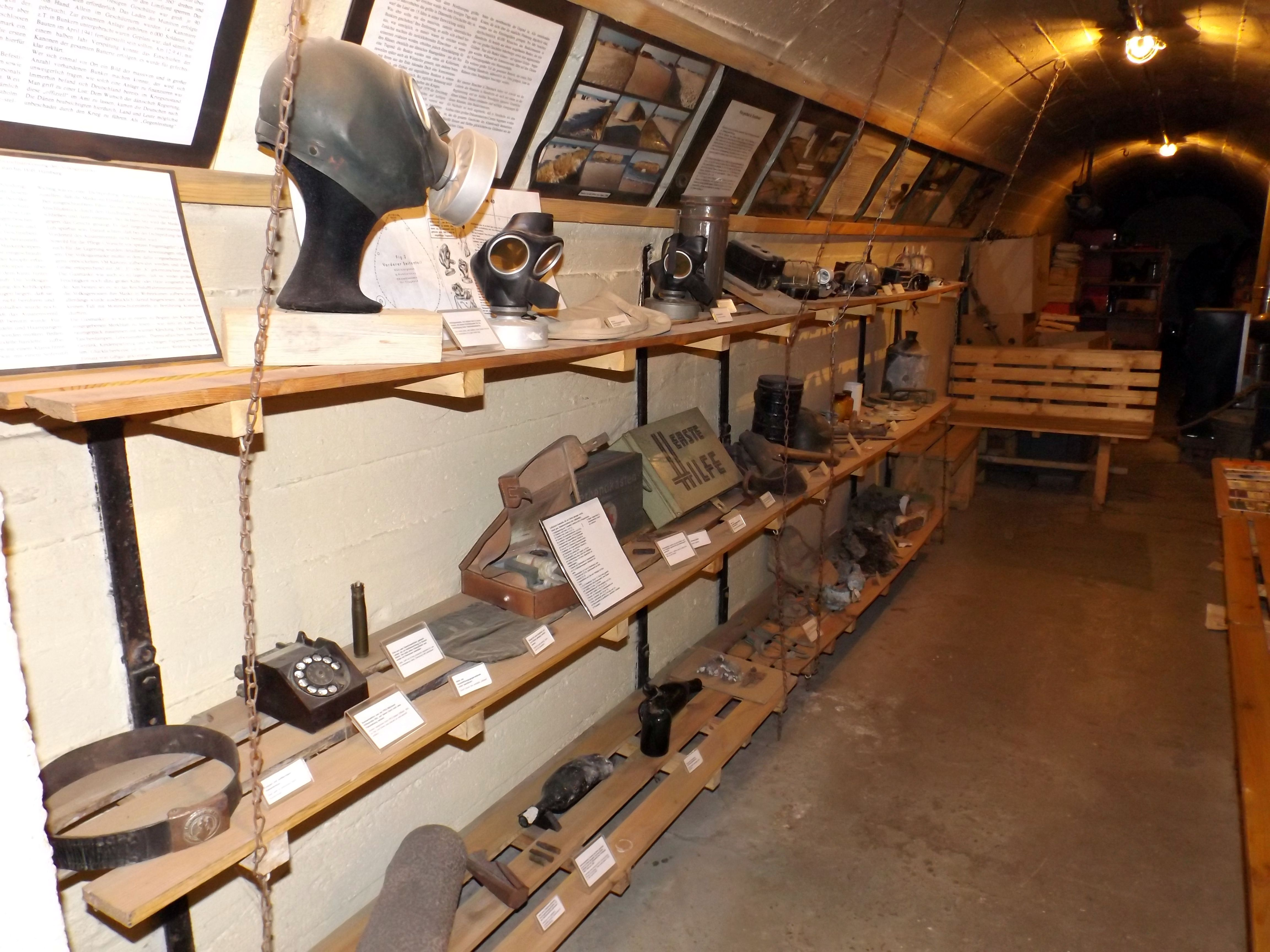 Bunkermuseum Hamburg-Hamm, Wichernsweg 16, Ausstellungsstücke This is a photograph of an architectural monument.